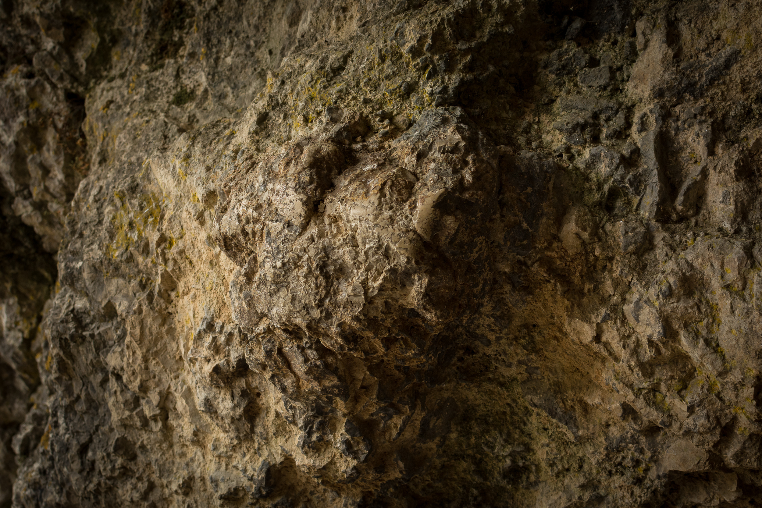 Bärenschliff in der Vogelherdhöhle bei Stetten ob Lontal. Er befindet sich kurz hinter dem Südeingang an der linken Höhlenwand in rund 2 Metern Höhe über dem heutigen Höhlenboden.